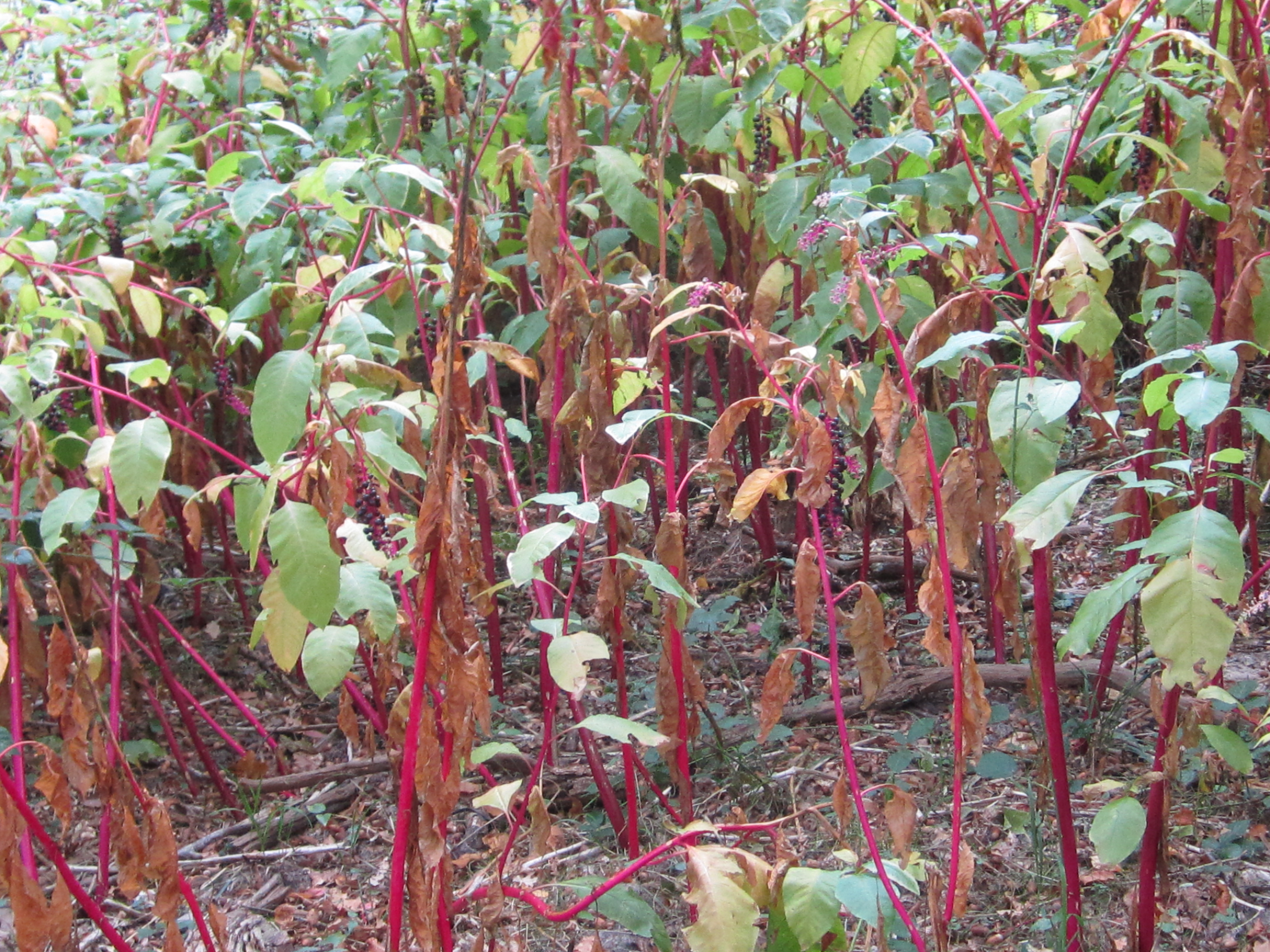 Exemple d 'invasion